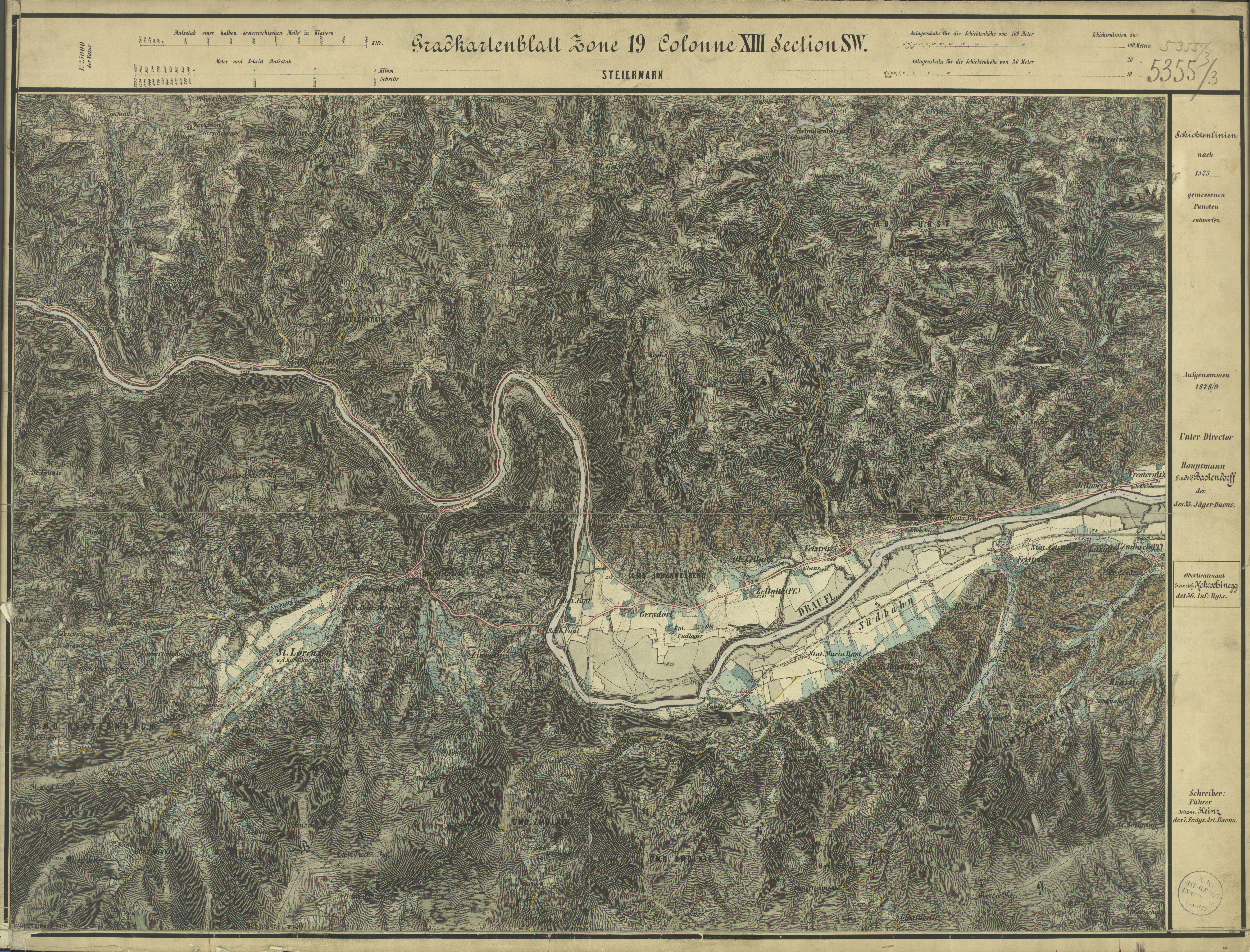 historische Landkarte: Gradkartenblatt Zone 19 Colonne XIII Section SW (später 5355/3). Drautal westlich Marburg, mit St.Oswald, Laßnitz. Franzisco-josephinische (3.) Landesaufnahme der österreichisch-ungarischen Monarchie. Aufnahmeblatt 1:25.000. Aufgenommen 1878/79